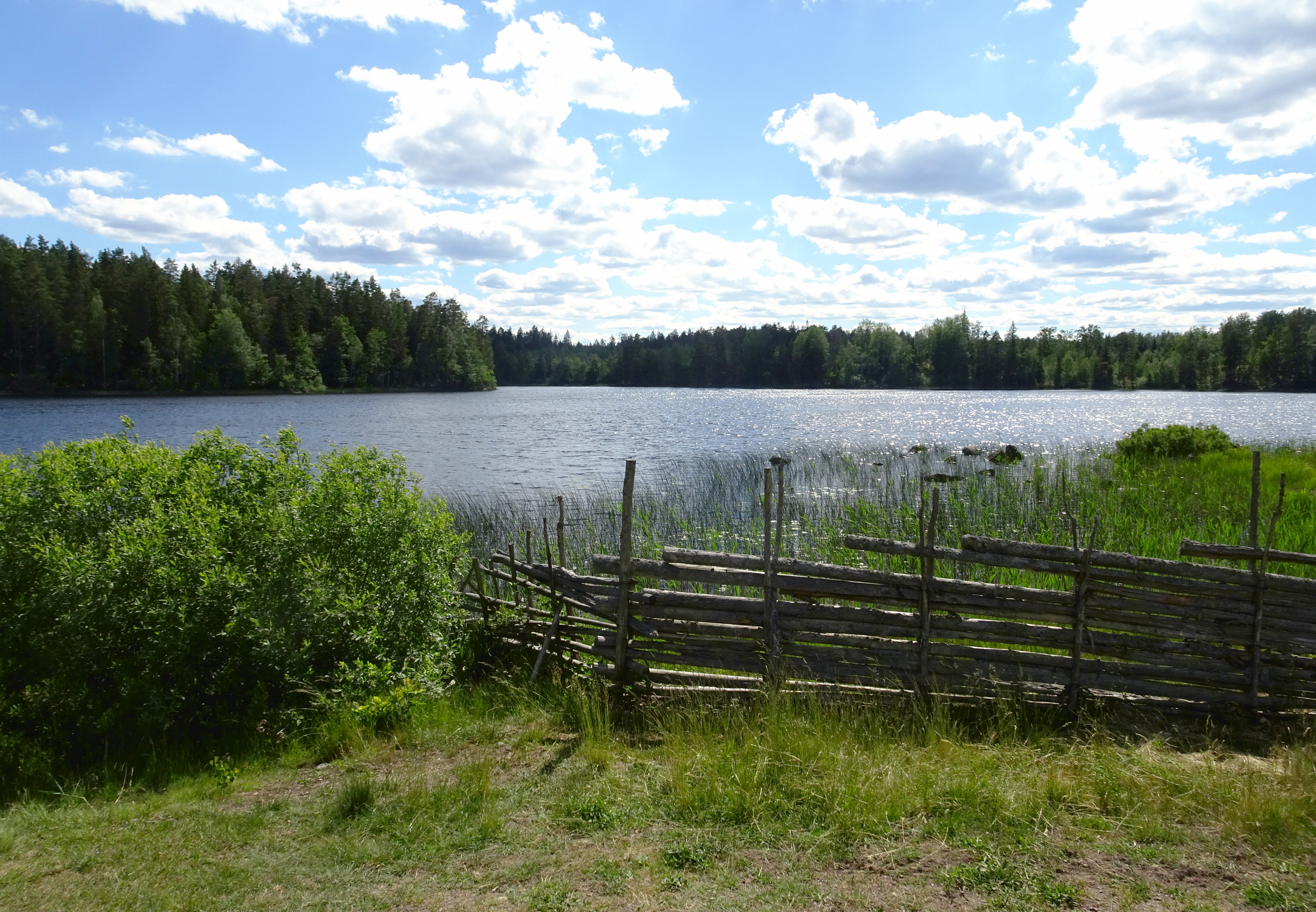 Sjön Stärringen vid Stensjö by, Oskarshamns kommun